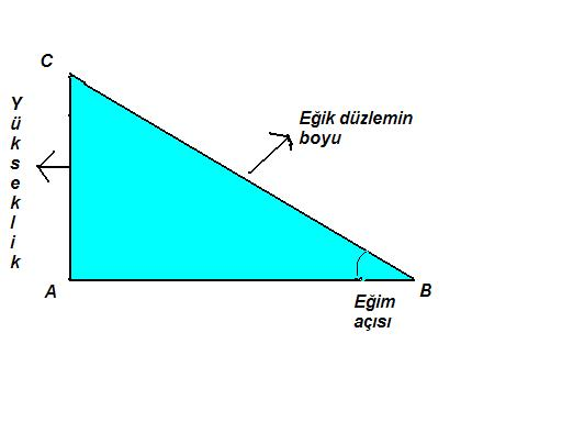 Eğik düzlemin gösterilişi